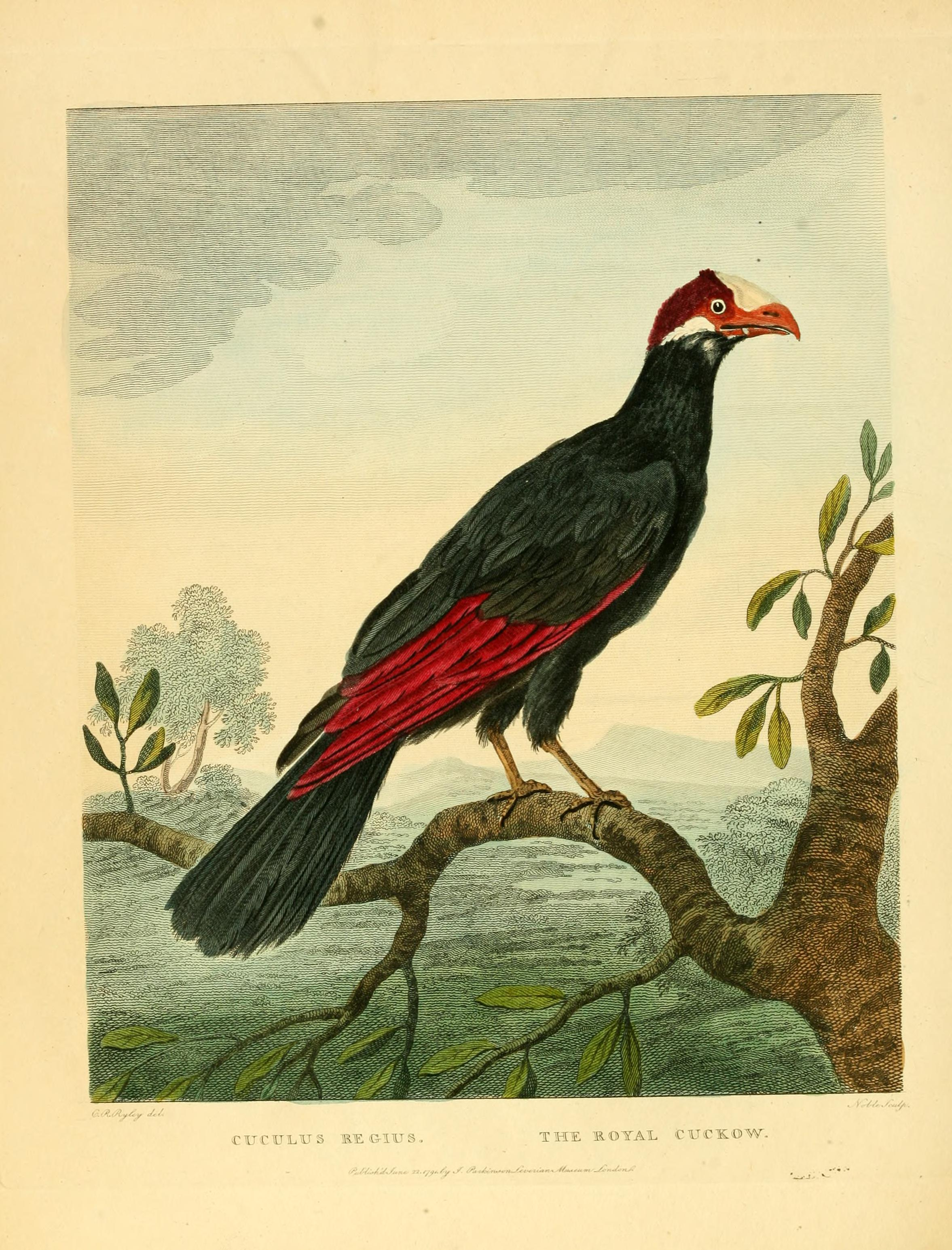 Musophaga violacea syn. Cuculus regiusMusei Leveriani explicatio, anglica et latina / opera et studio Georgii Shaw ... ; adduntur figuræ, eleganter sculptæ et coloratæ.